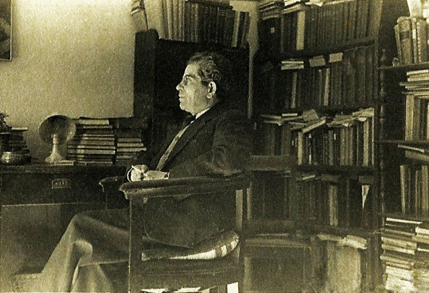 מרדכי מיכאלי